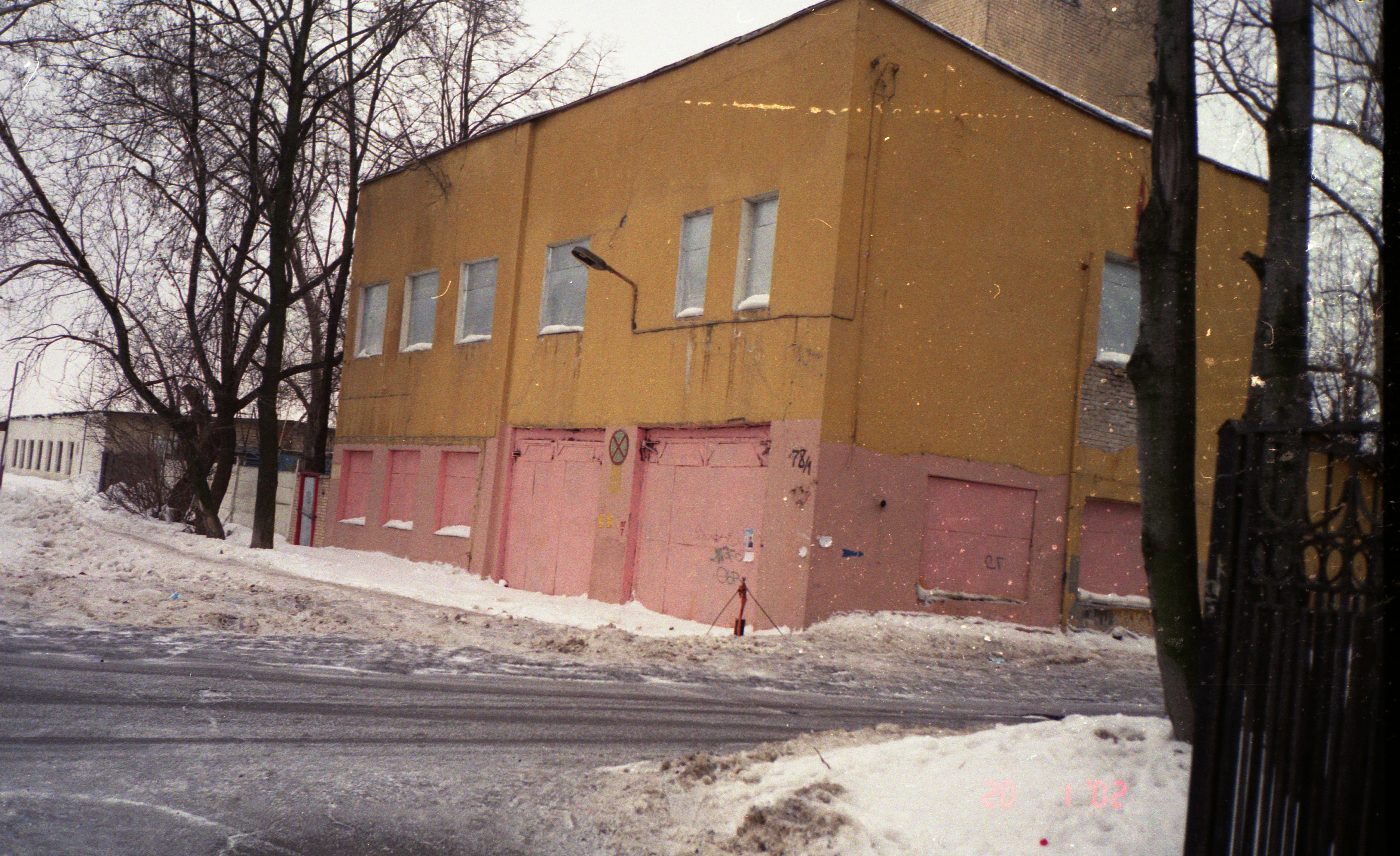 Здание пожарной станции в посёлке Москворечье, снесено и заменено на автосервис и магазин Moscow. Olympus mju-II camera, Konica VX200